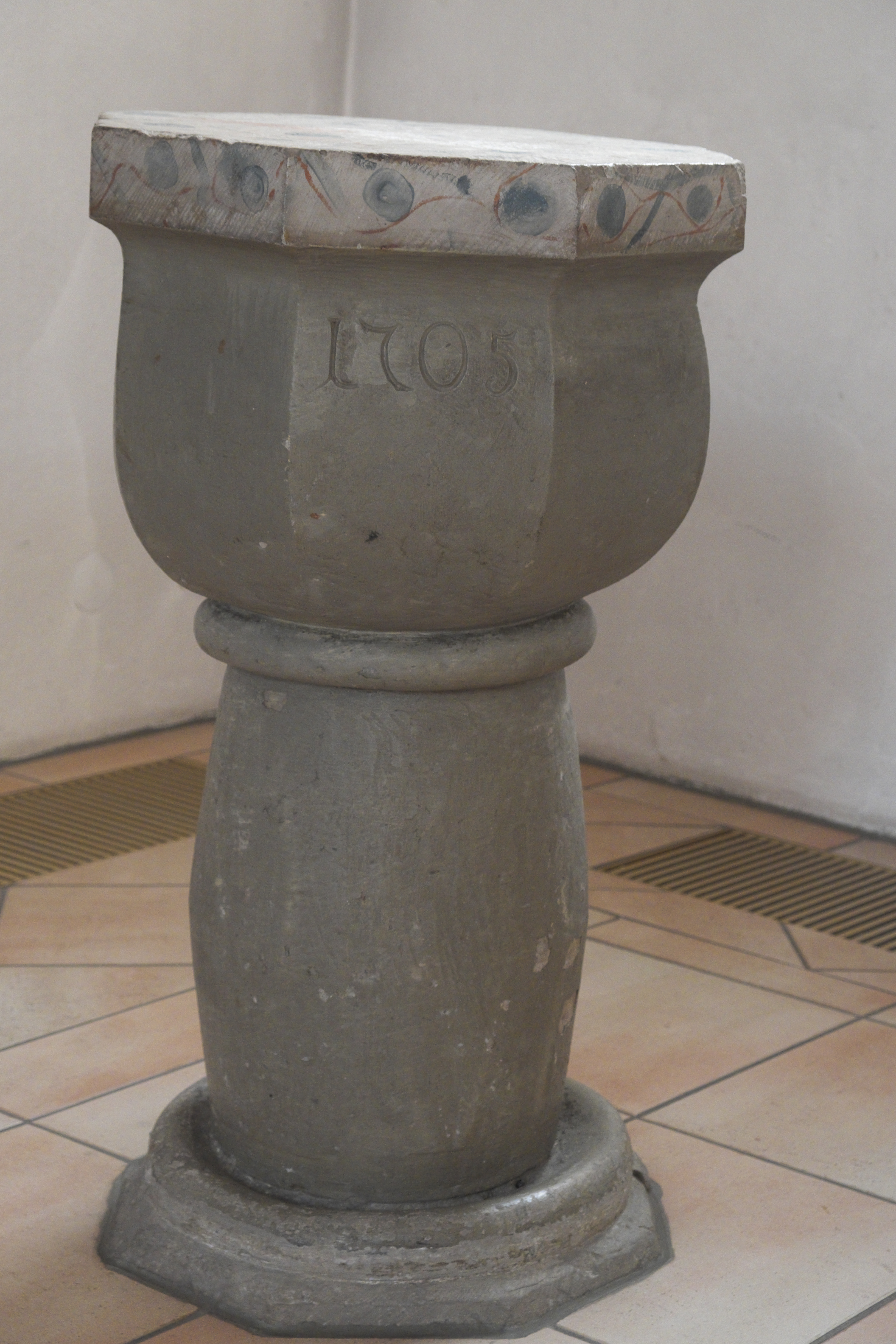 Stadtkirche in Rosenfeld im Zollernalbkreis (Baden-Württemberg/Deutschland), Taufbecken mit der Jahreszahl 1705